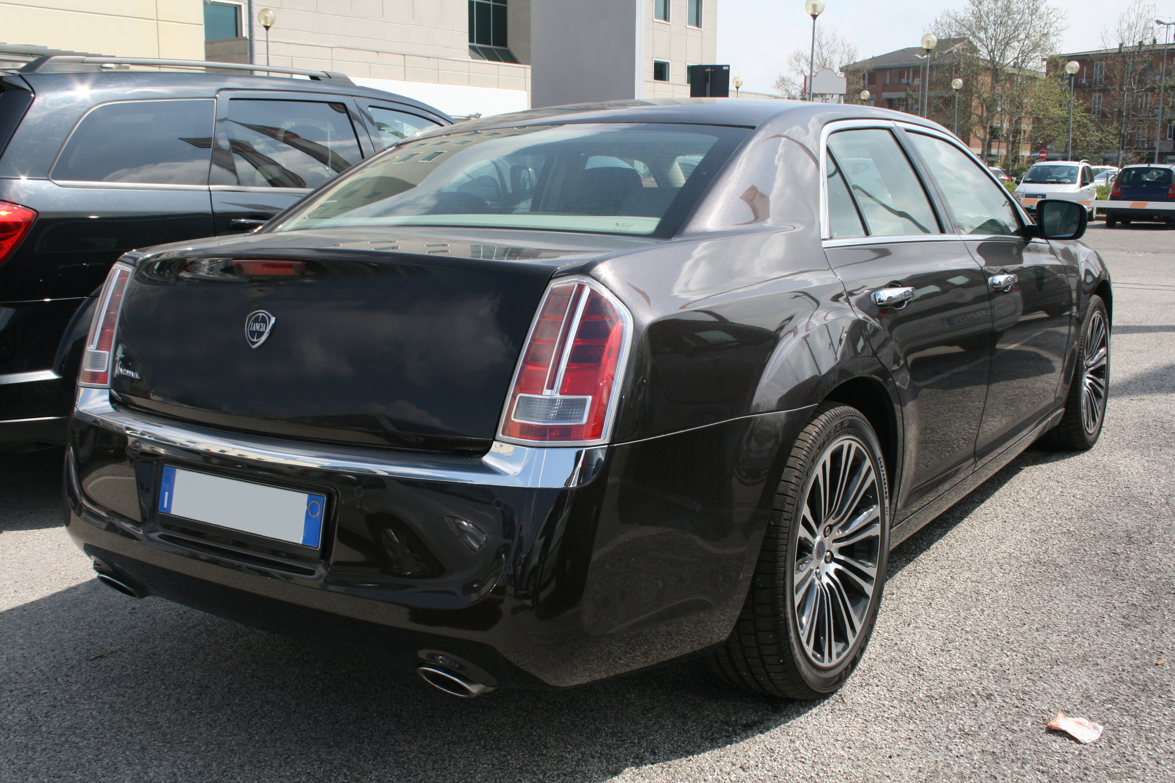 Una Lancia Thema fotografata a Milano in un parcheggio di un centro commerciale